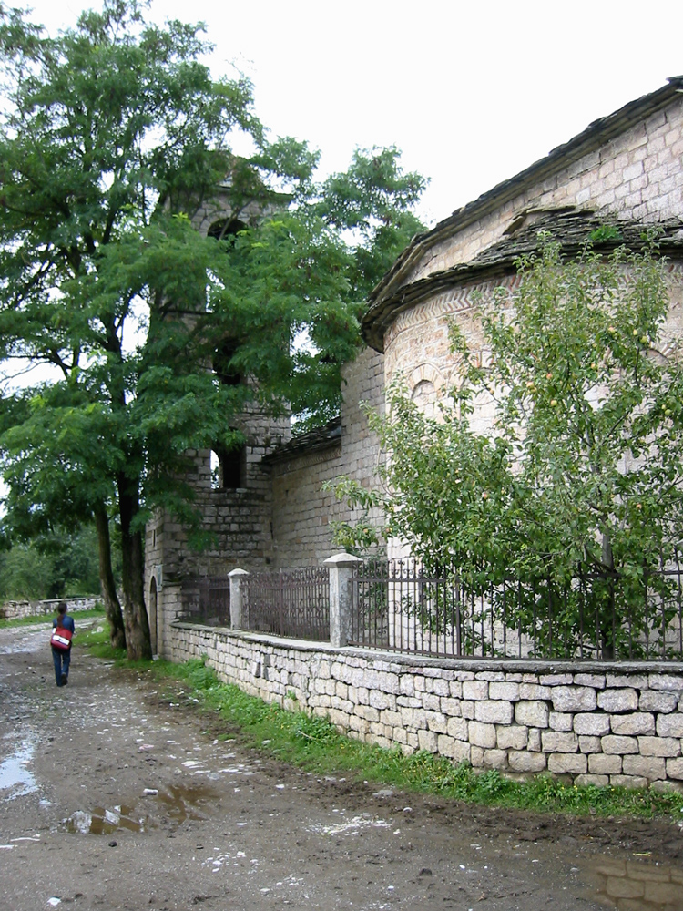 Apsis und Glockenturm der Kirche Shën Kollë in Voskopoja aus dem Jahr 1721.